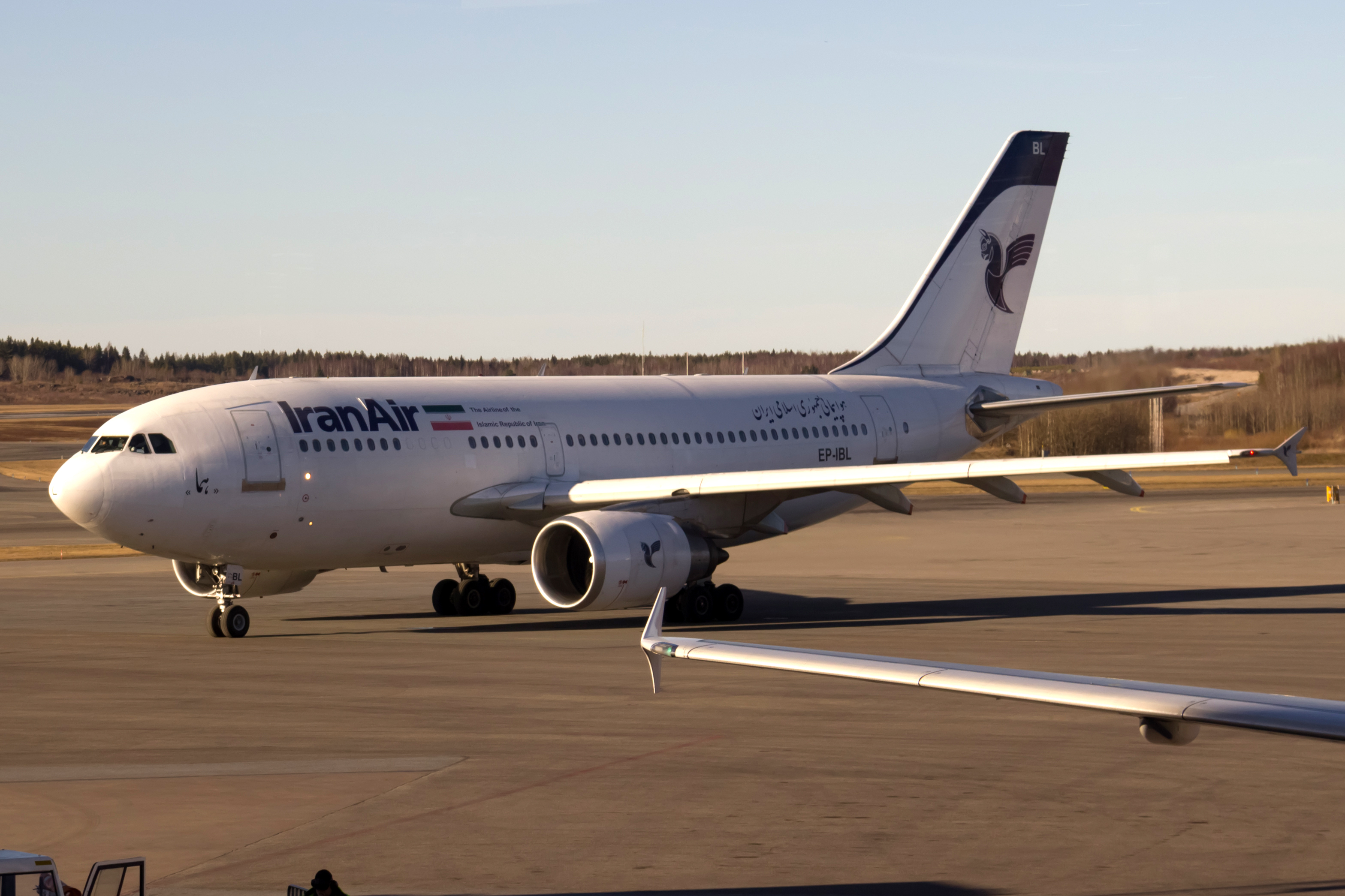 Airbus A310 de Iran Air no aeroporto de Estocolmo-Arlanda.